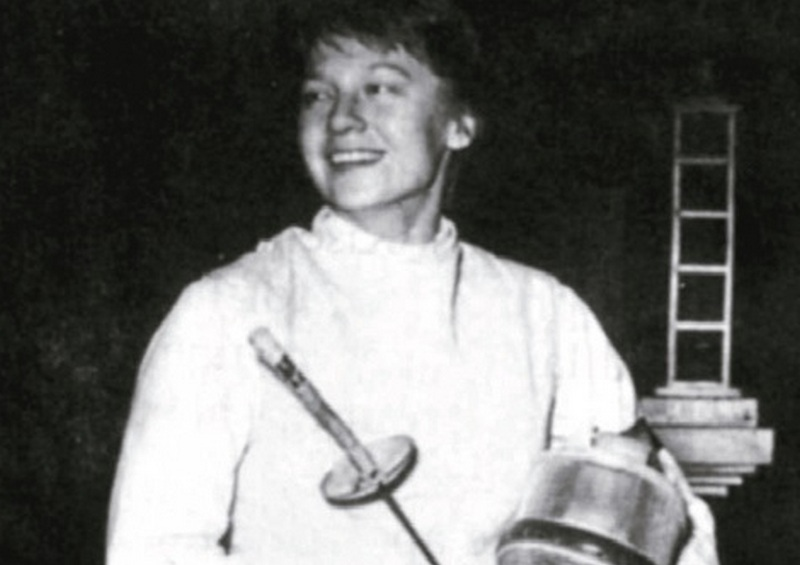 Olga Orban